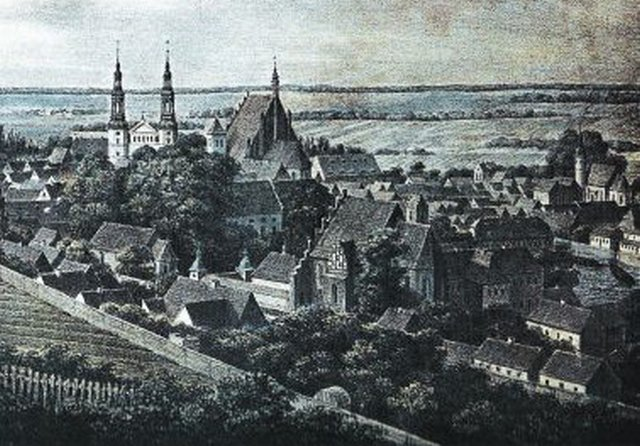 Panorama Bydgoszczy ze wzgórz szwederowa ok. 1830 r. - fragment obrazu J.C. Cederholma